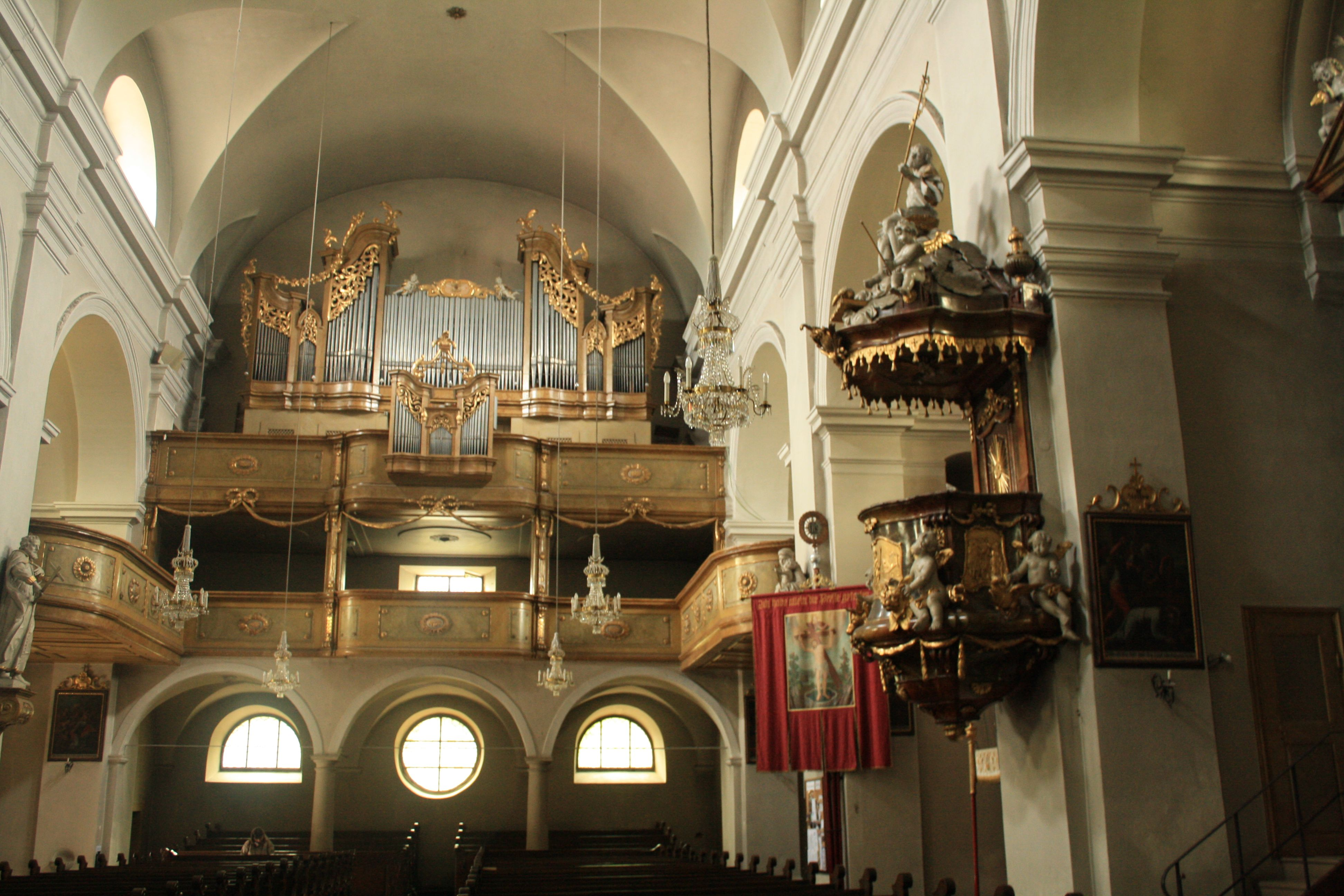 Pfarrkirche von Poysdorf